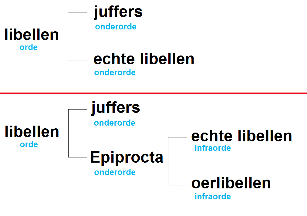 Odonata taxonomy